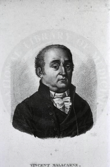 Vincenzo Malacarne